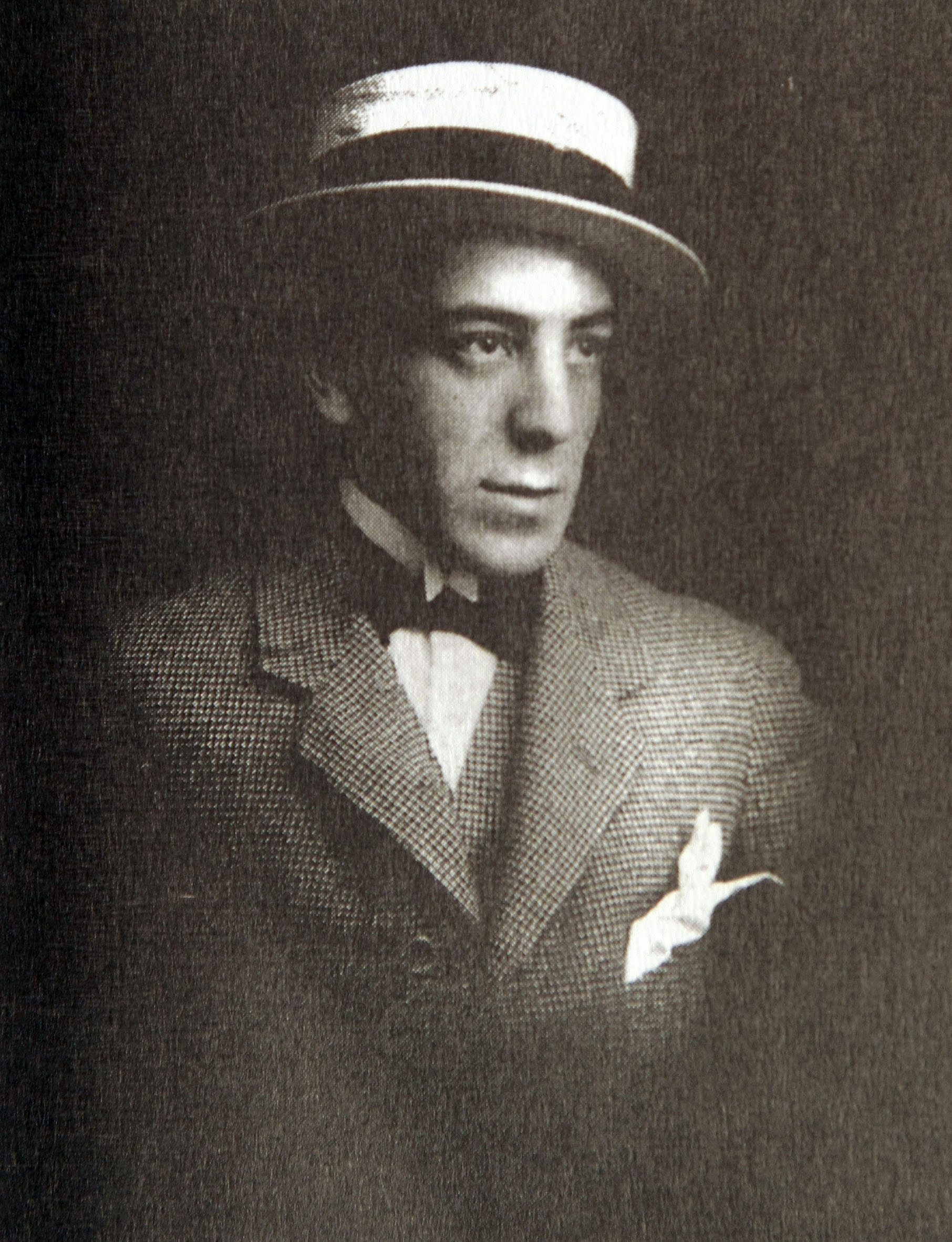 Pedro Sienna, cuyo nombre real era Pedro Pérez Cordero (San Fernando, 13 de mayo de 1893 - Santiago, 10 de marzo de 1972), fue un poeta, dramaturgo, periodista, crítico de arte, actor de teatro, productor, actor y director de cine mudo chileno.